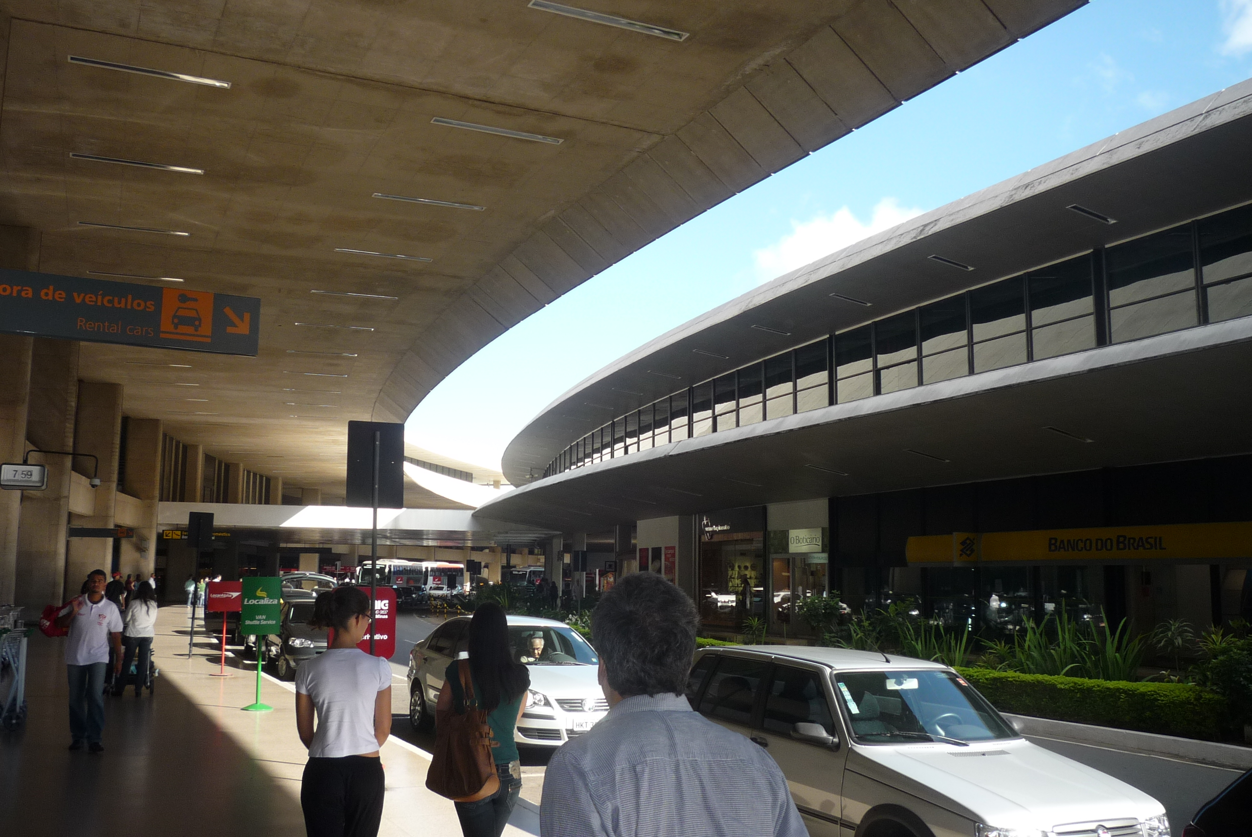 Aeroporto internacional Tancredo Neves - Confins - MG